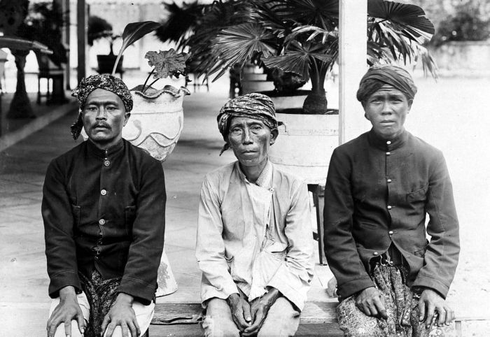 Repronegatief. Madoerees dorpshoofd en twee dorpsbewoners, en face